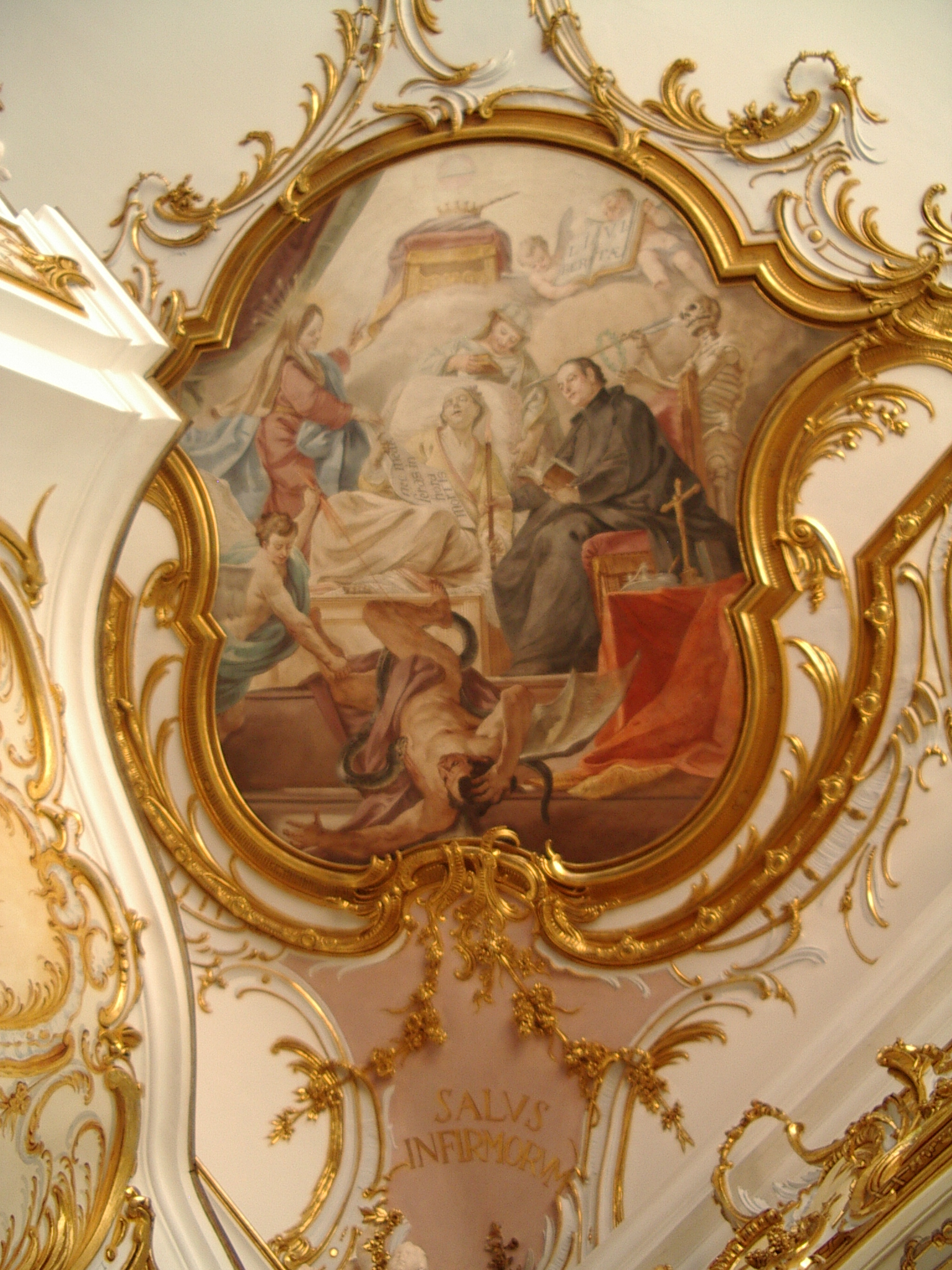 Photographie einer Eckinschrift im Kleinen Goldenen Saal (Augsburg)